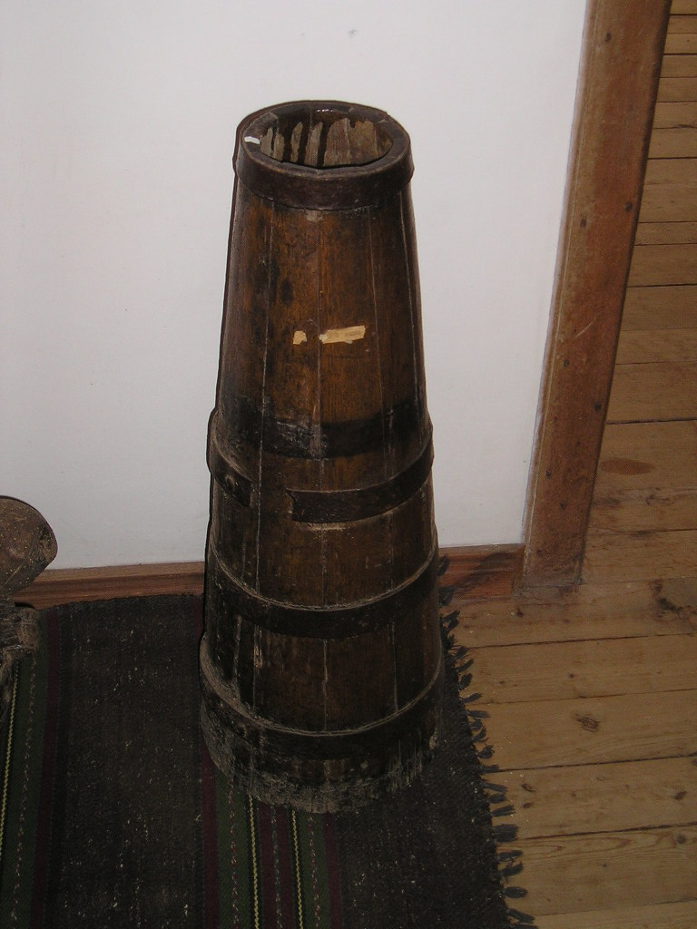 Template:Картинка инфо